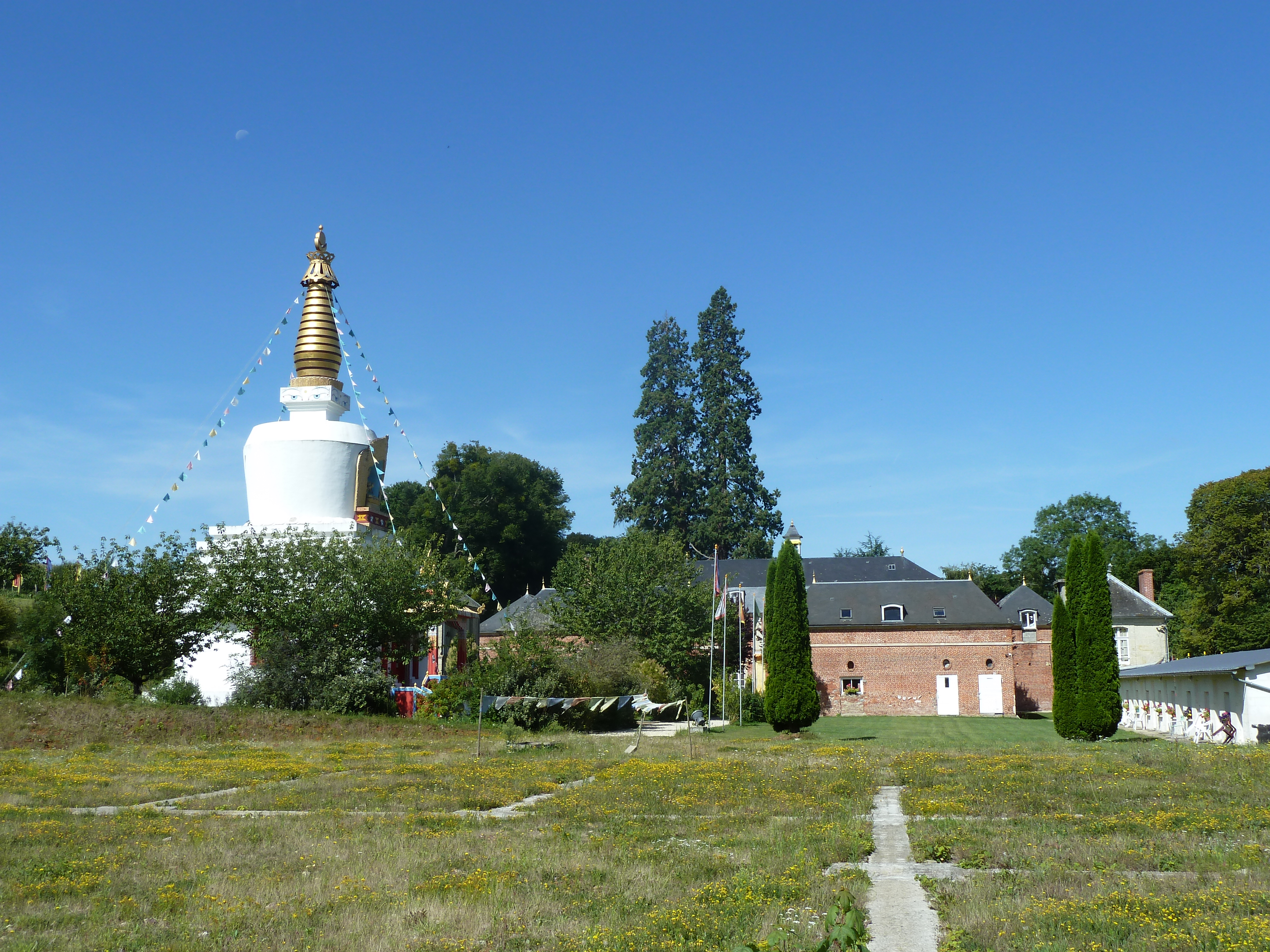 Vajradhara-Ling P1060685 - les fondations du Temple pour la Paix